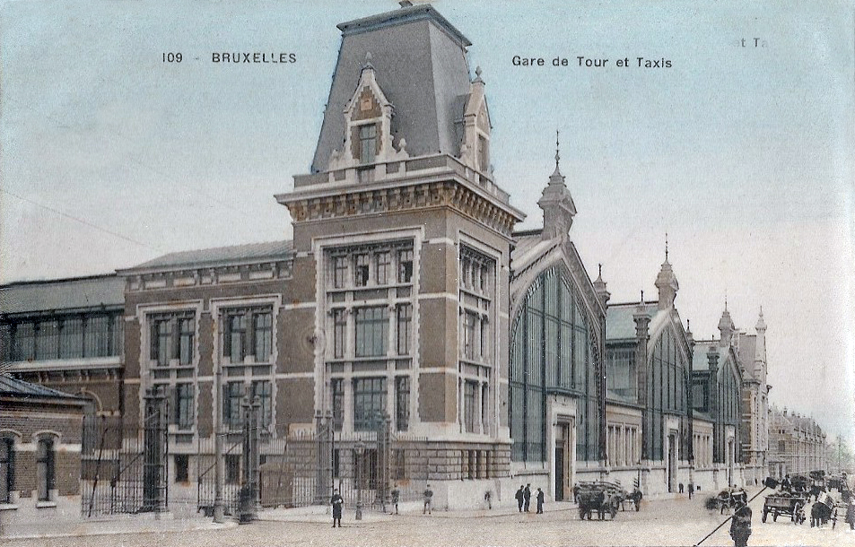 Bâtiments de la gare de Bruxelles-Tour et Taxi vers 1910.